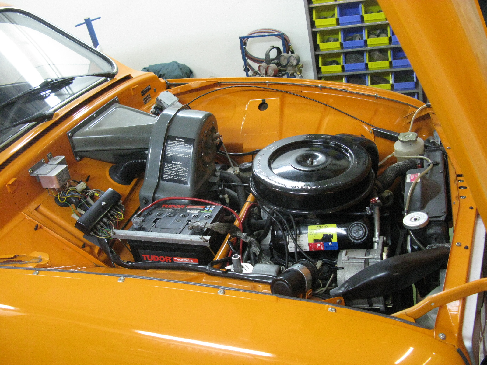 Saab 96 V4